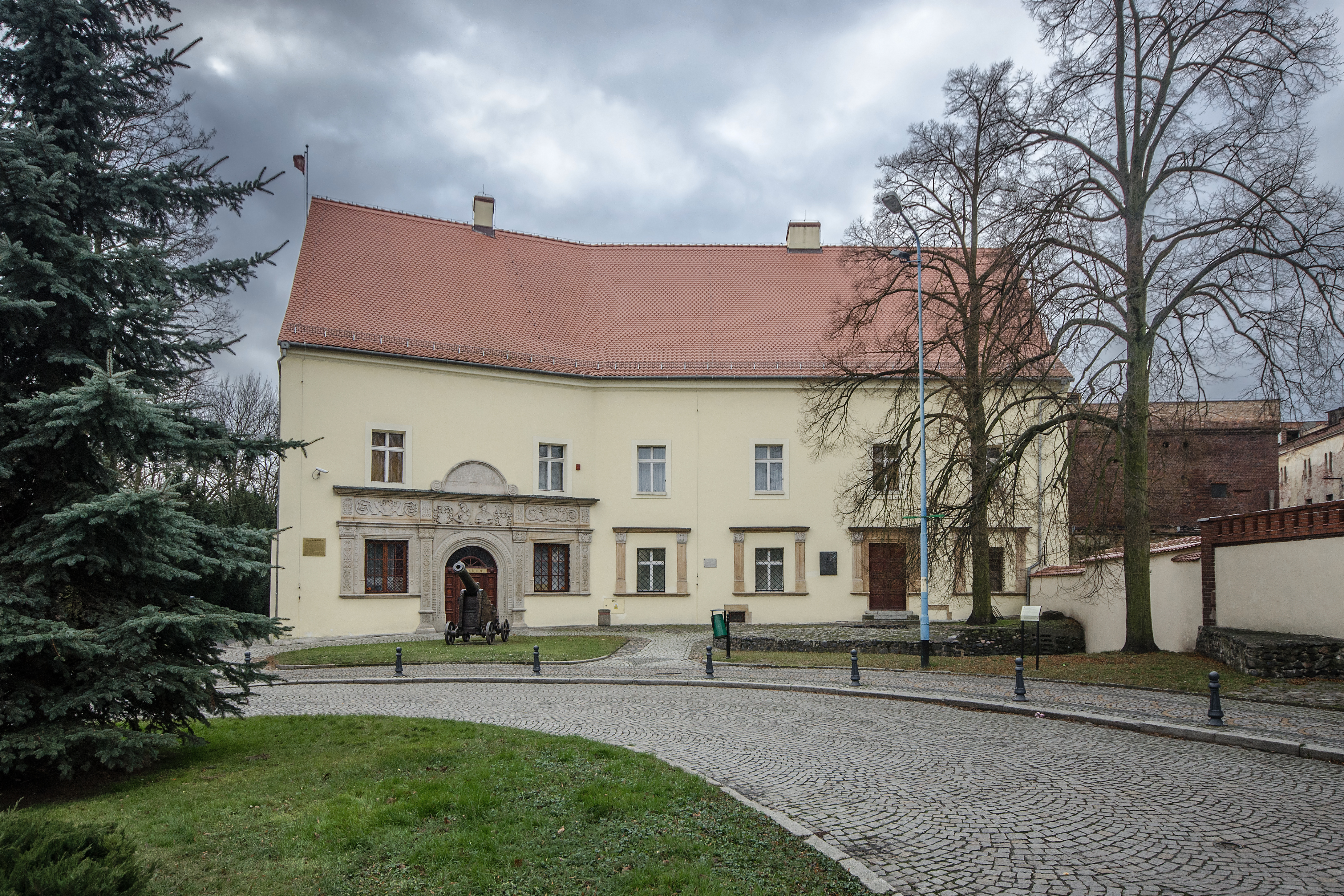 Chojnów, zamek, ob. Muzeum Regionalne, XIV, XX